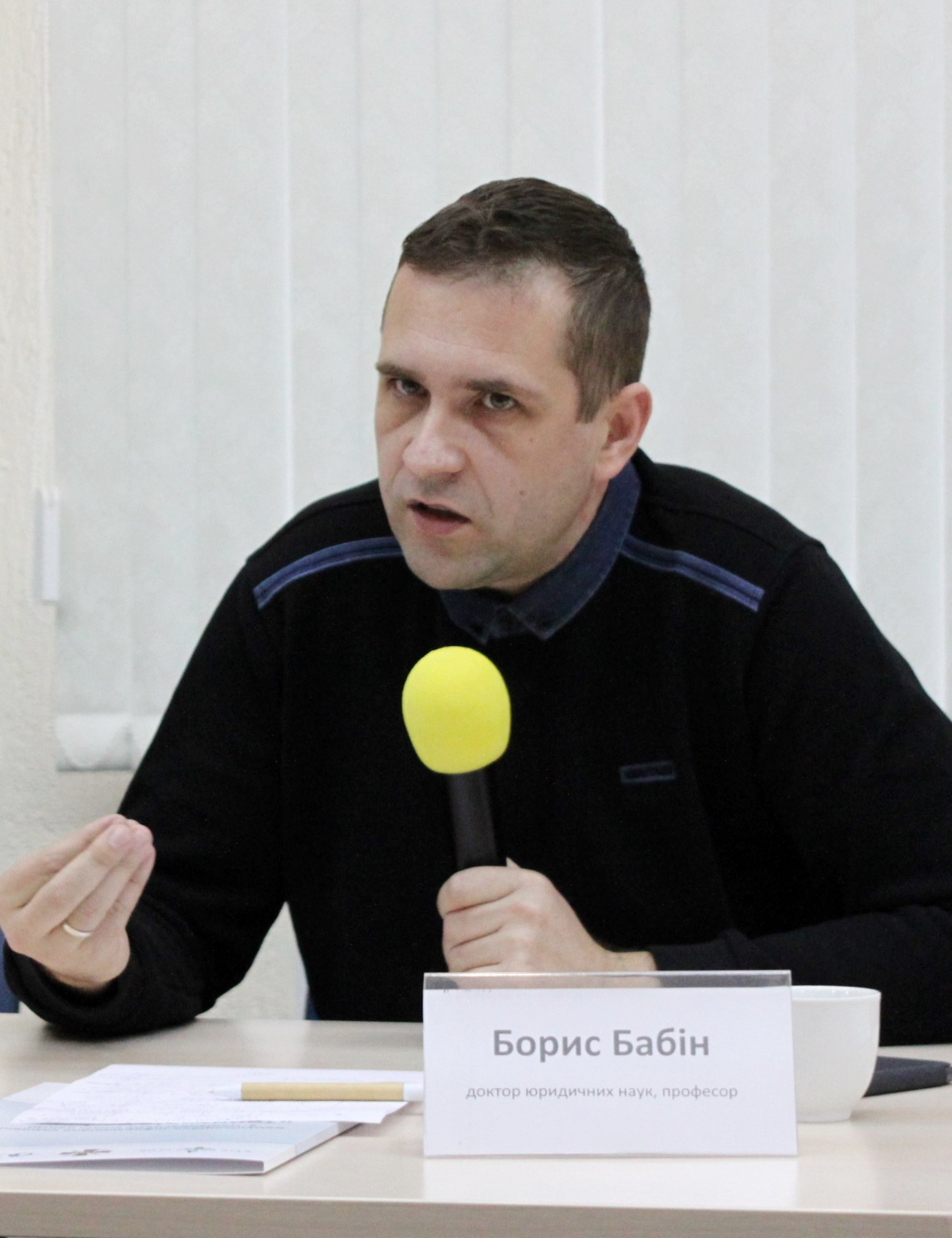 Борис Бабін у прес-центрі Національної спілки журналістів України (Київ, 2018)